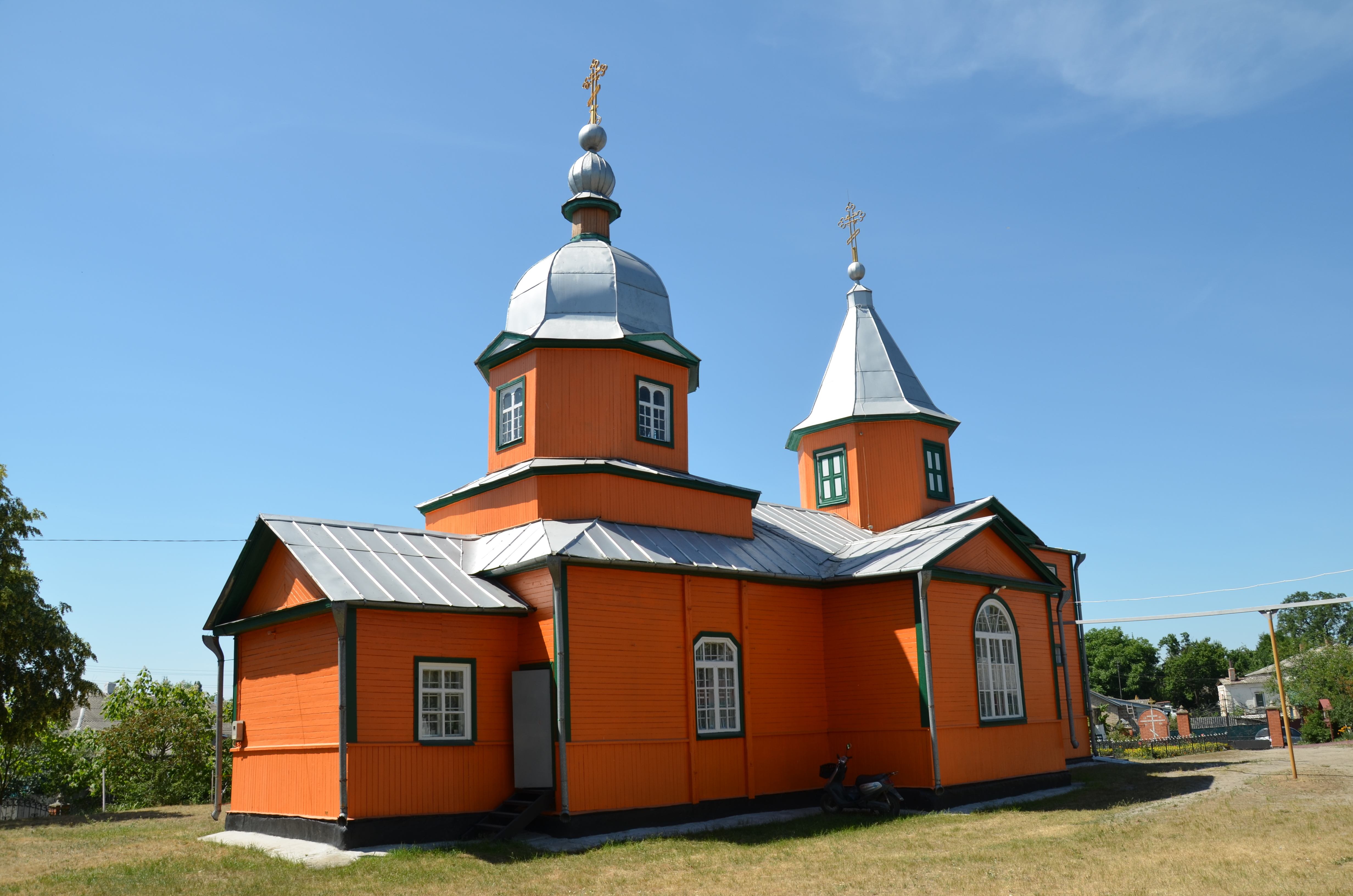 Церква Іоанна Богослова (дер.), смт Борова